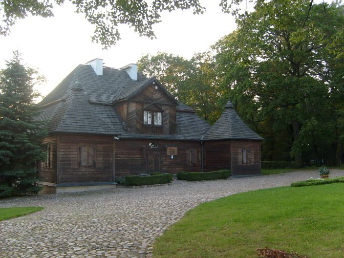 Muzeum Wnętrz Dworskich w Ożarowie.